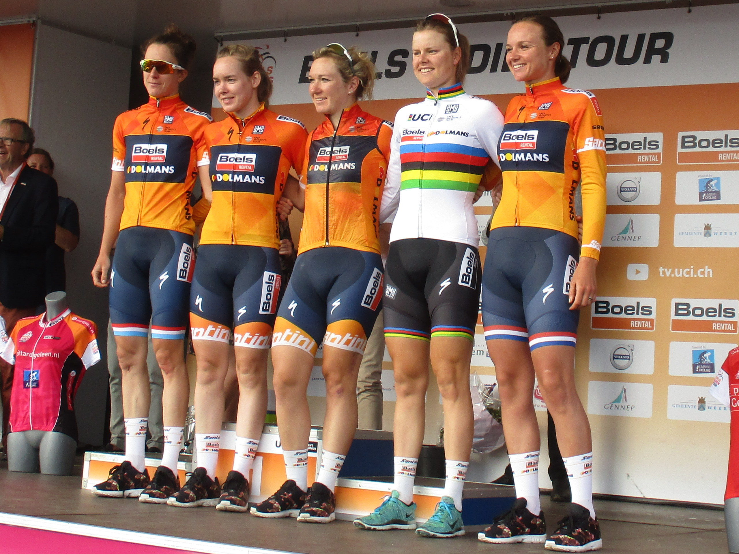 Huldiging van de winnaars van de Boels Ladies Tour 2017 op het Tom Dumoulin Bike Park in Sittard-Geleen.